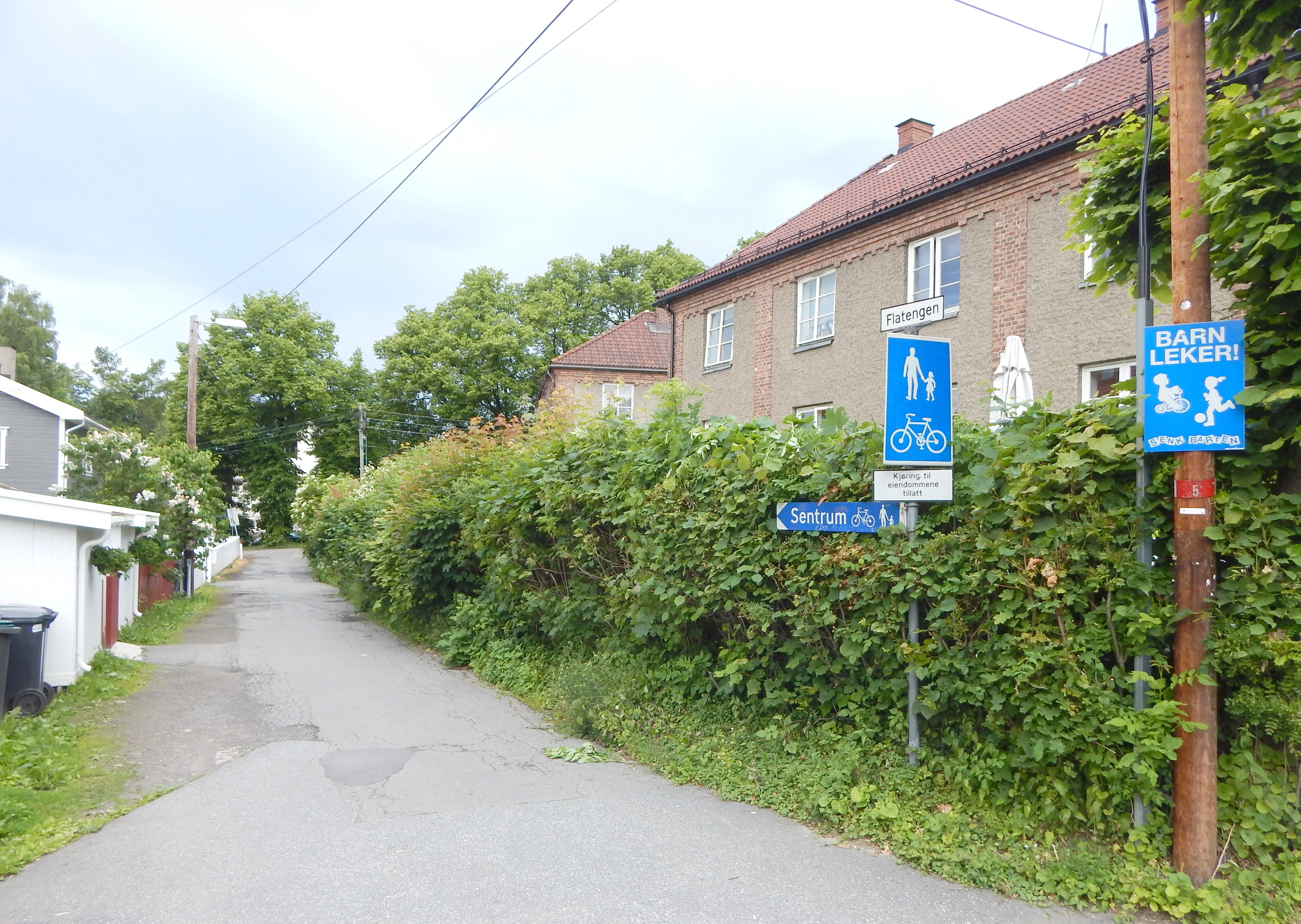 Flatengen